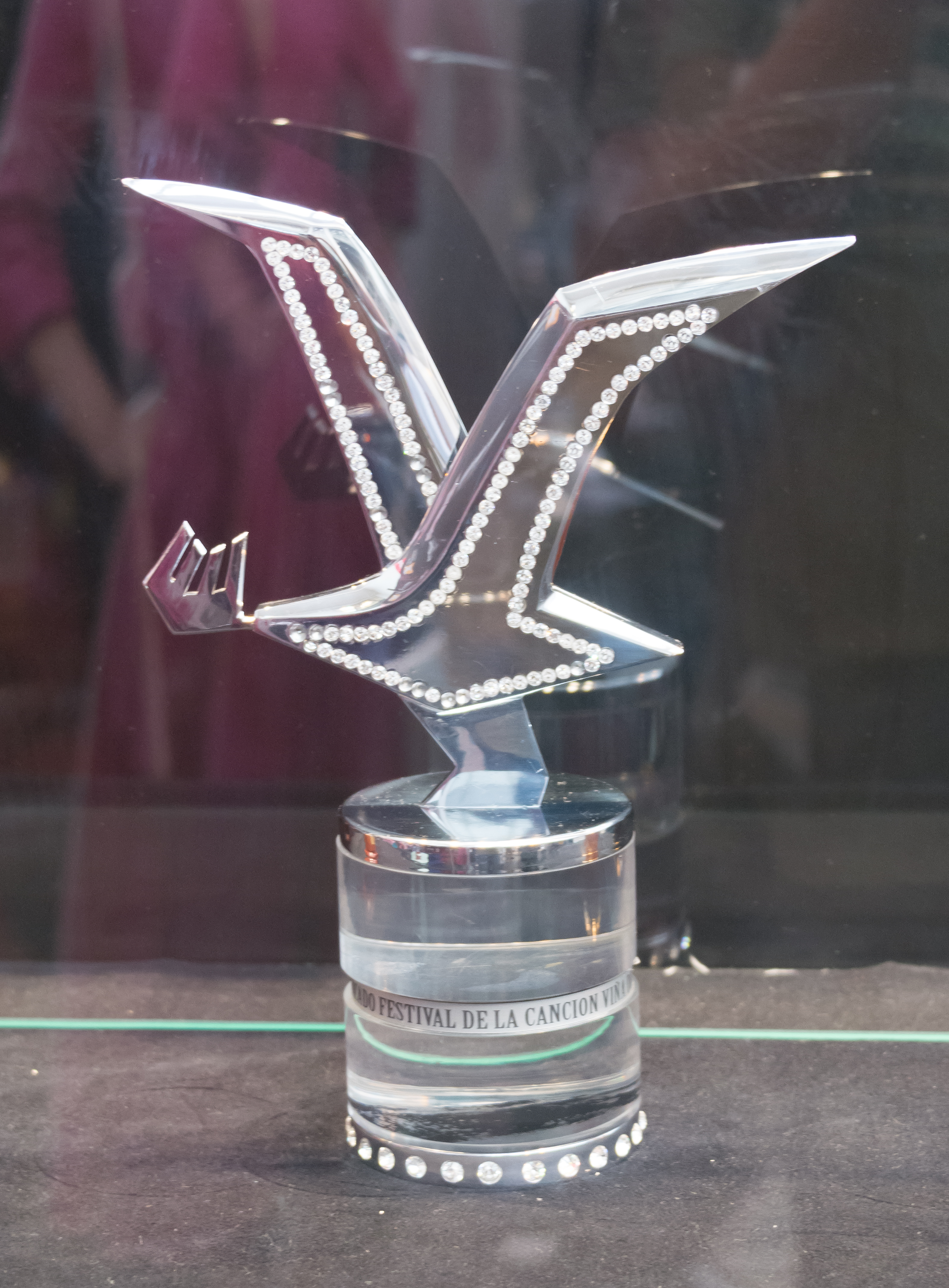 Feria vacaciones tercera edad Sernatur 2019, Providencia, Santiago, Chile.